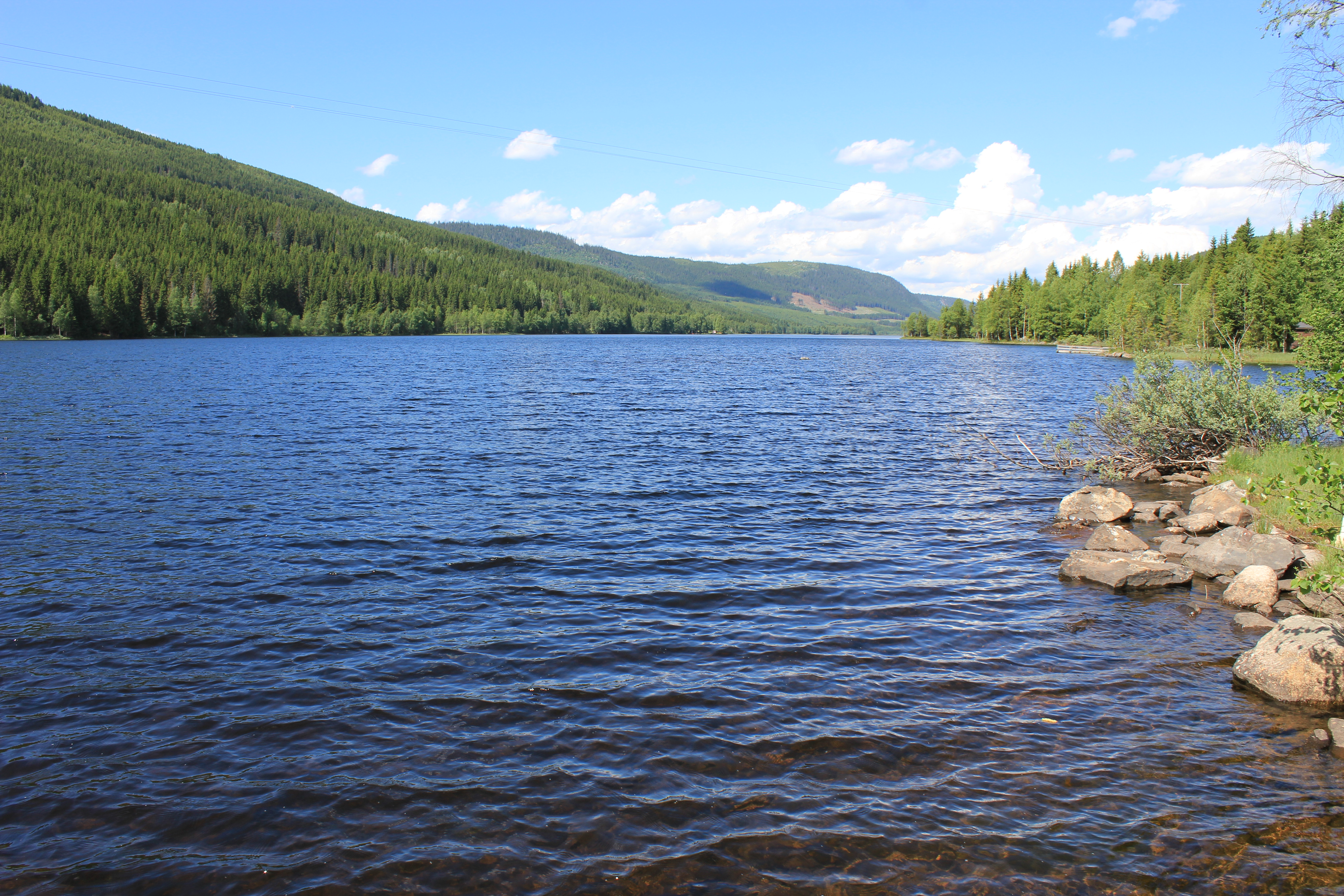 Hersjøen på Totenåsen sett sørfra og nordover